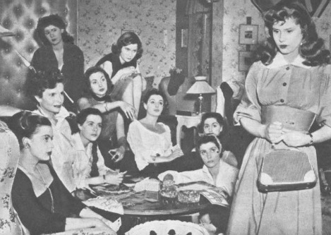 Foto di scena del film Fanciulle di lusso, regia di Bernard Vorhaus (1952). Tratta da "Cinema" n. 118, 1953